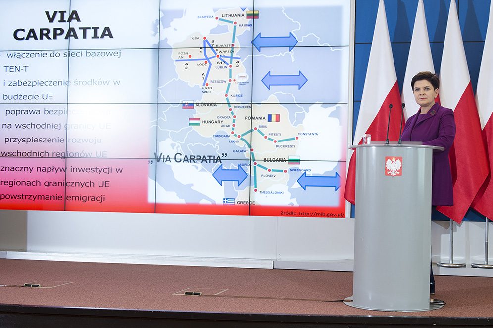 La Premier ministre polonaise Beata Szydlo faisant une présentation de Via Carpatia